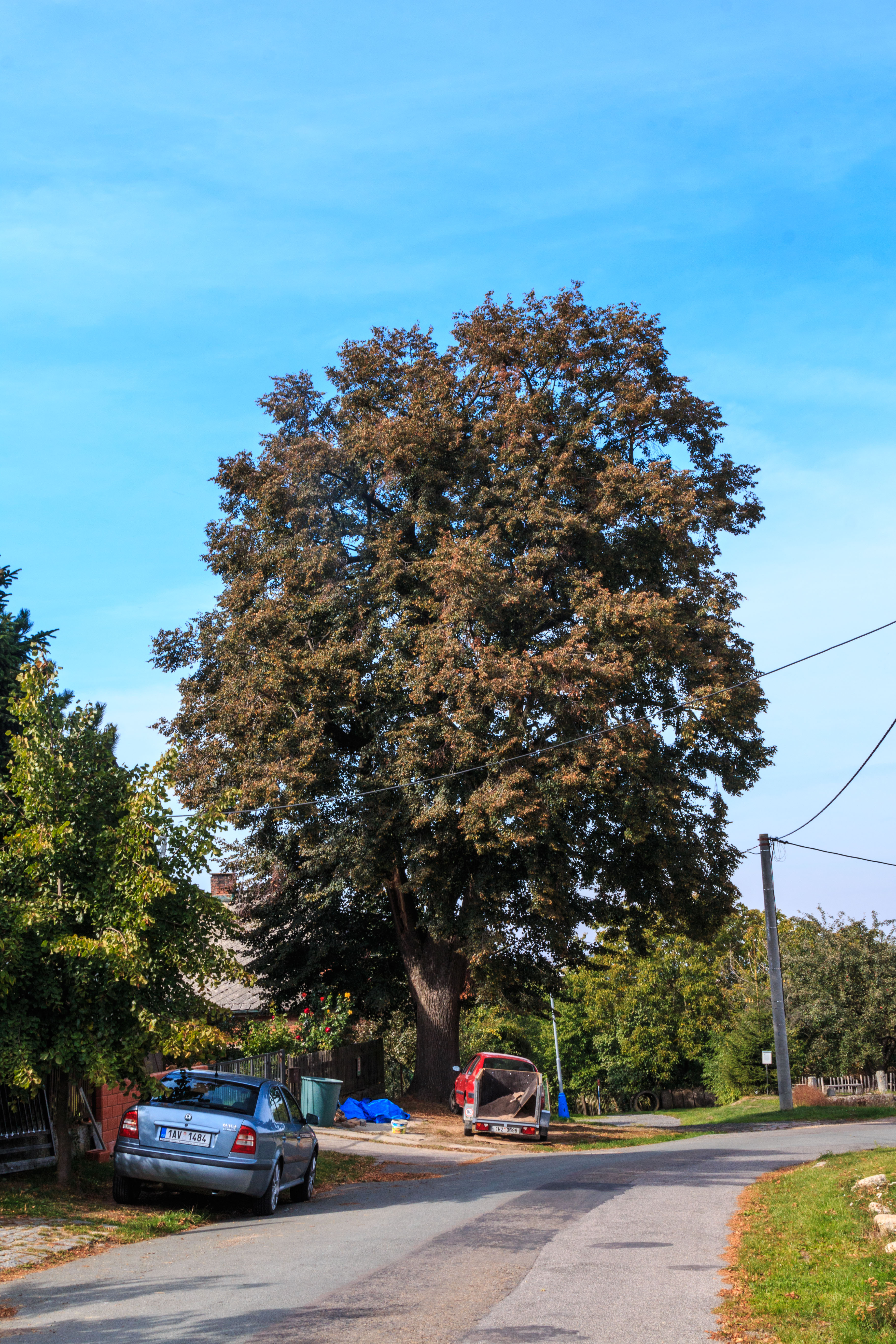 Památná lípa v Trávníku Project: Vodstvo.